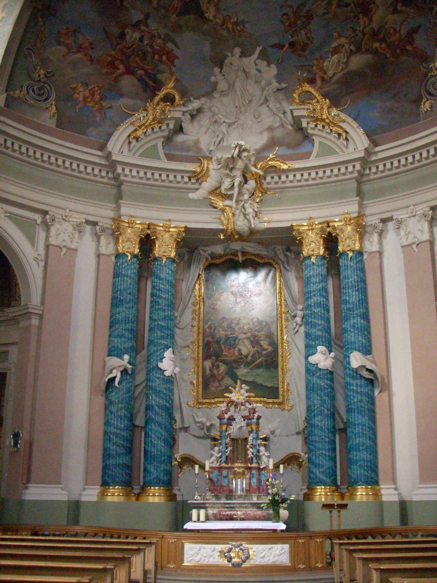 St. Clemens Münster, Hauptaltar